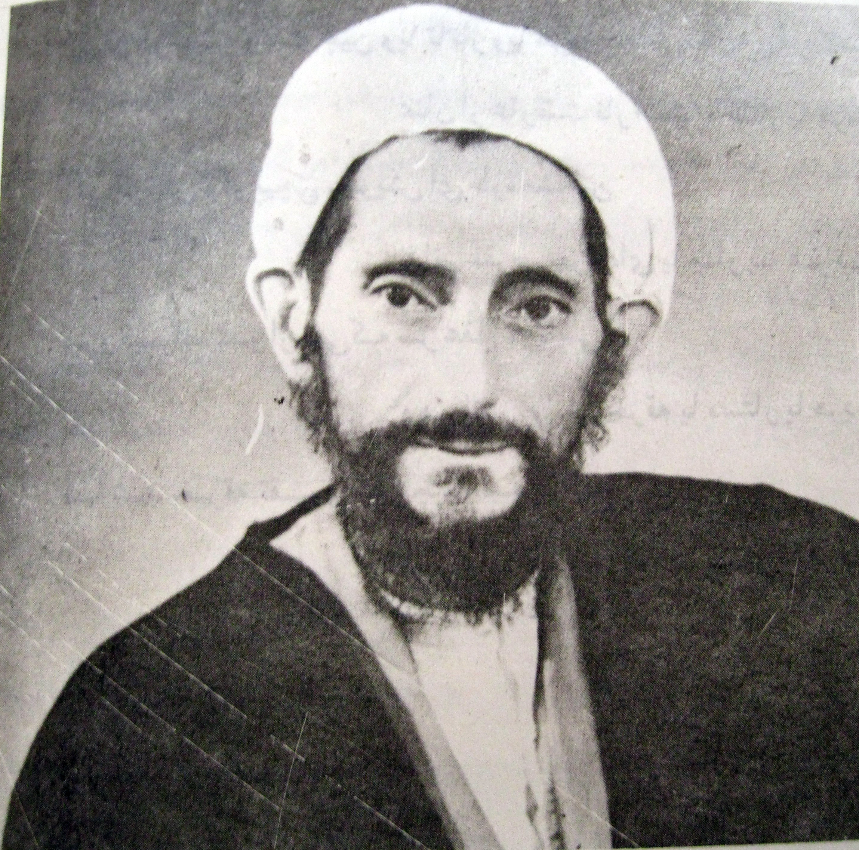 روح‌الله کمالوند